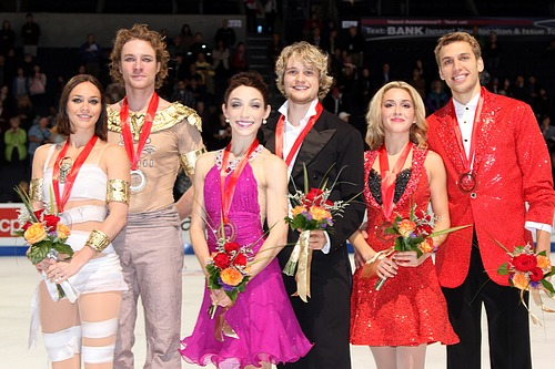 Подиум в танцах на льду на турнире 2011 Skate America. Слева на право: Натали Пешала / Фабьян Бурза, Мэрил Дэвис / Чарли Уайт, Изабелла Тобиас / Дейвидас Стагнюнас